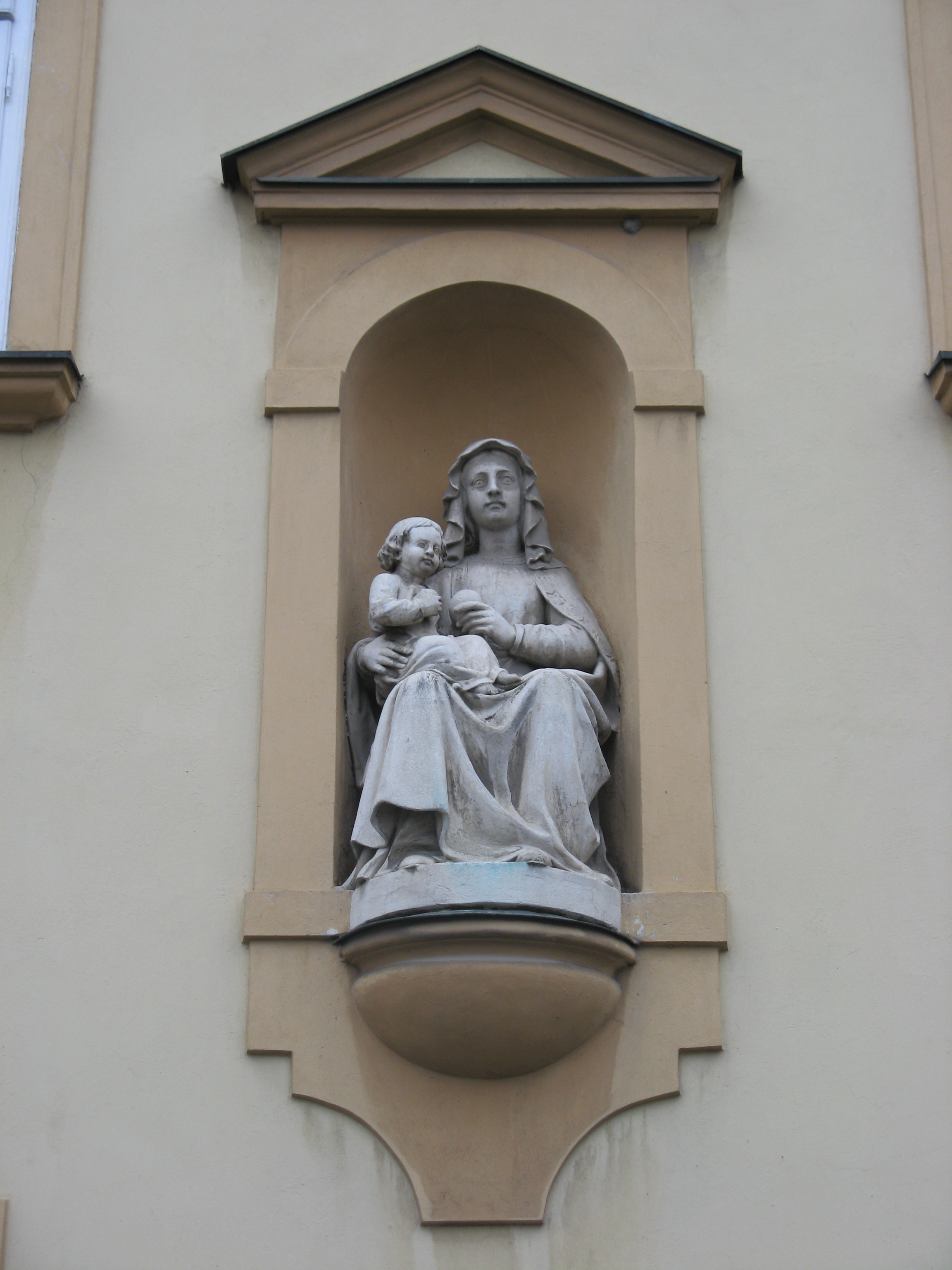 Nischenfigur der hl. Anna (1. Hälfte 19. Jh.) mit Kind am Schloss Altmannsdorf in Wien-Meidling